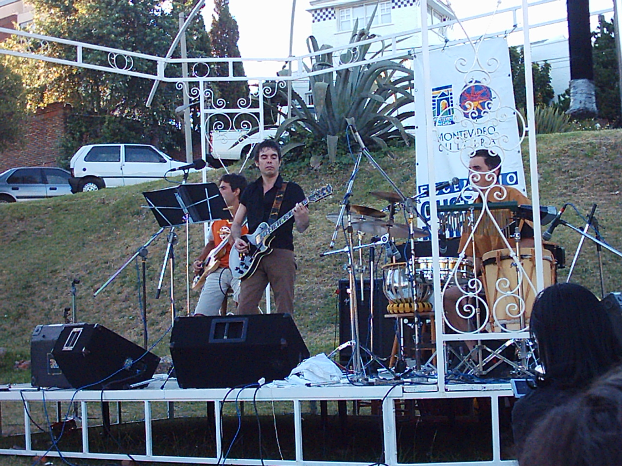 Fotografía del músic uruguayo Fernando Cabrera.